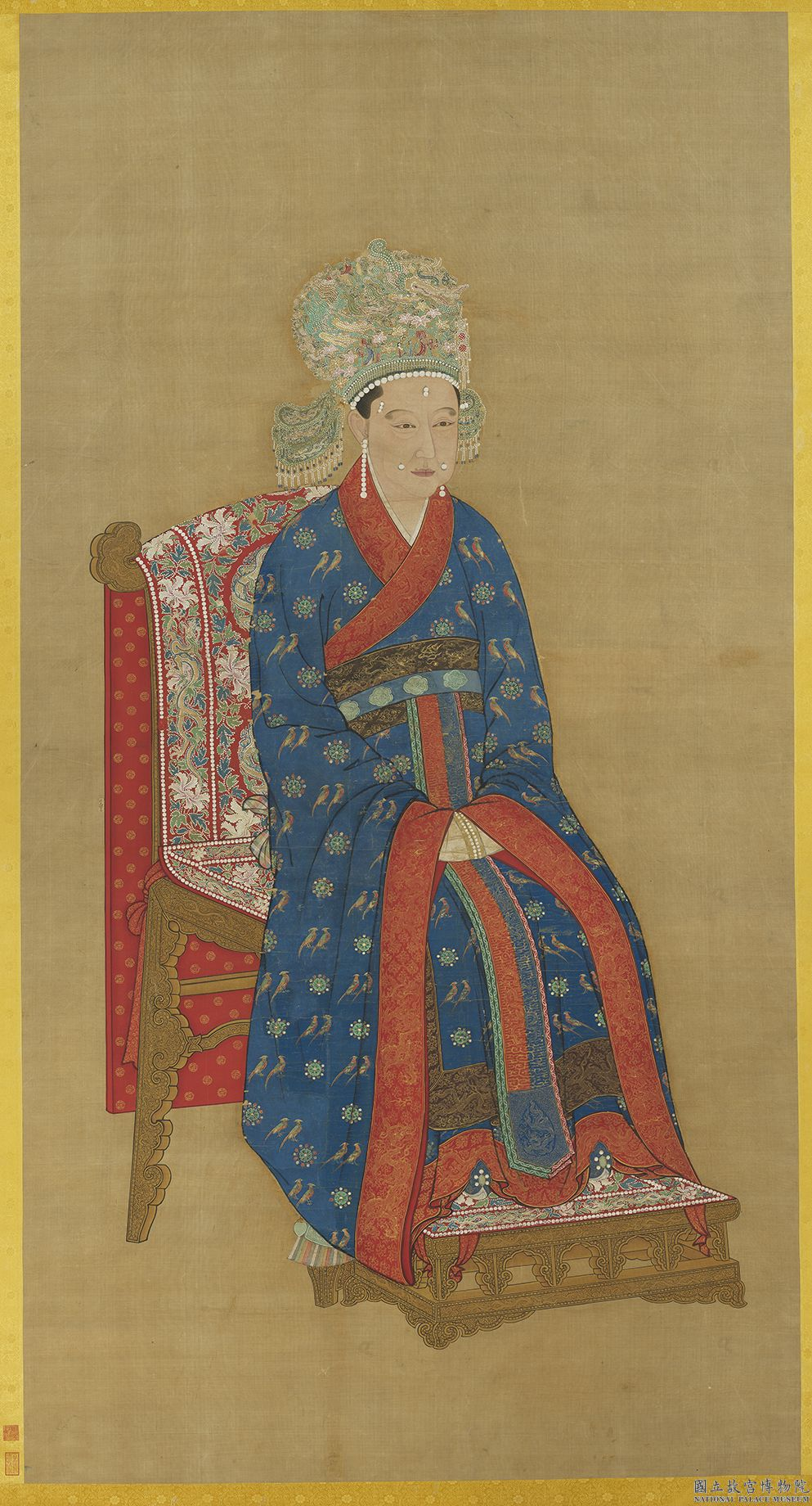 Portrait assis de l'impératrice Li